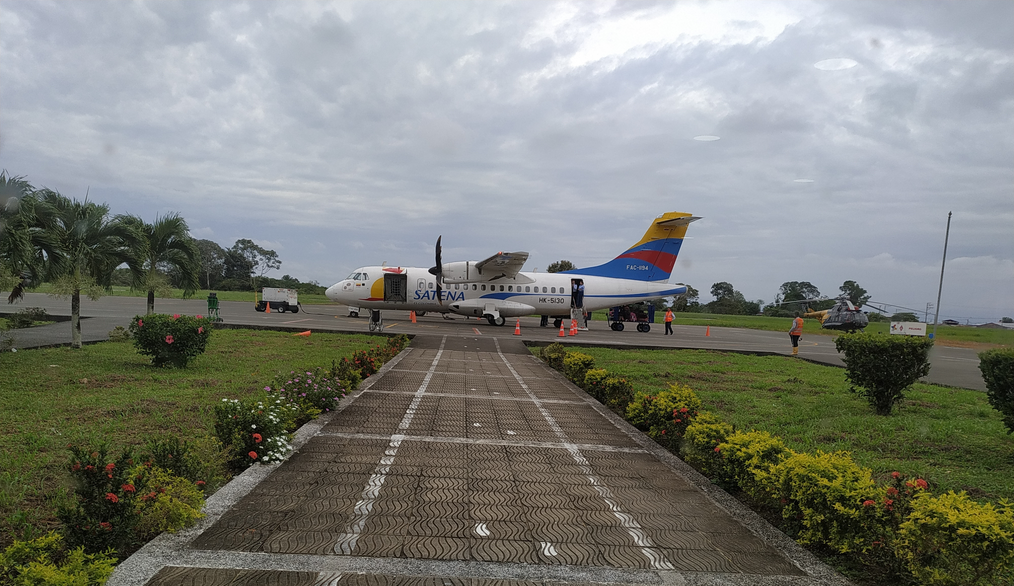 Atr 42 en el Aeropuerto La Florida